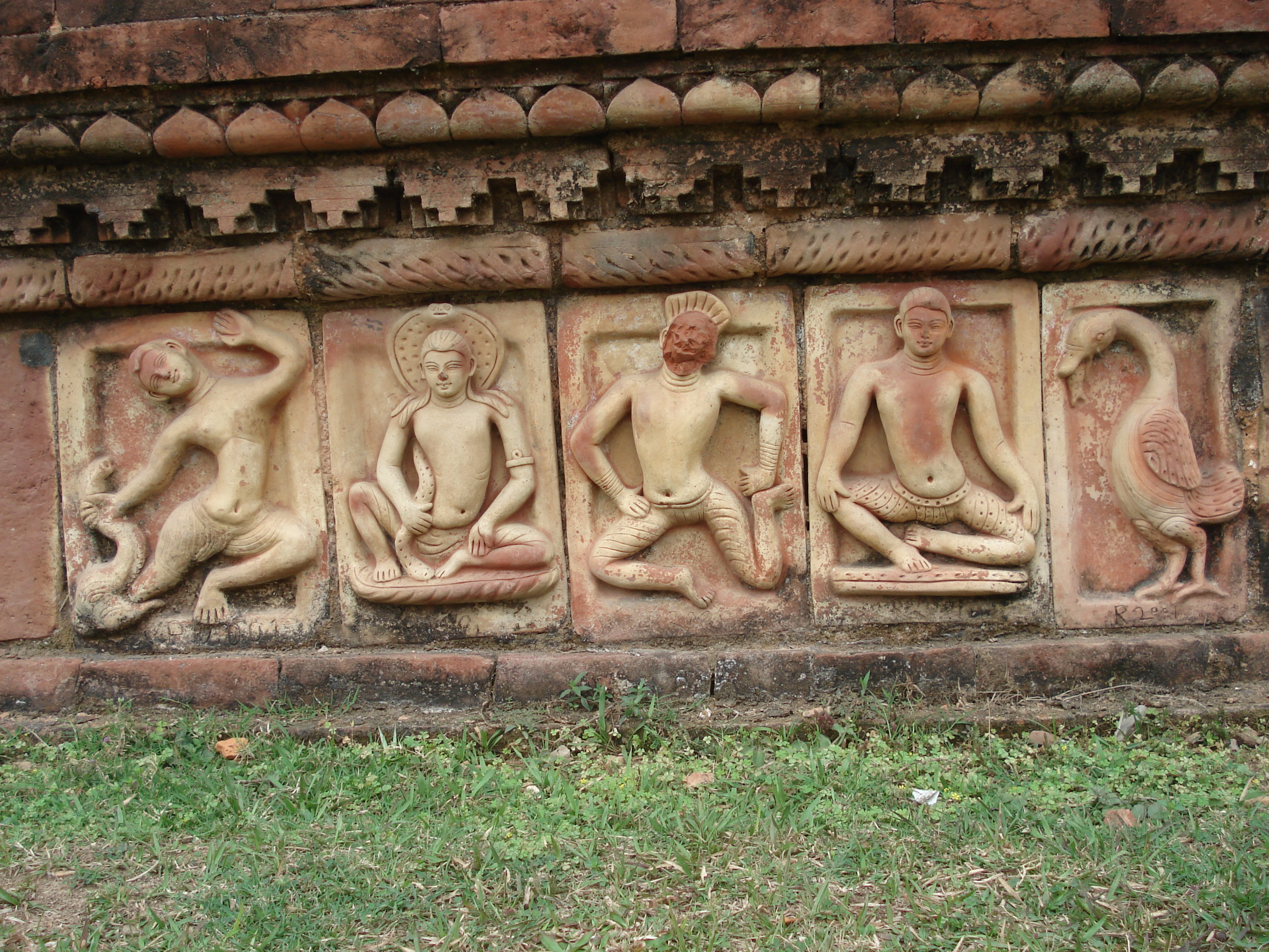 29 March 2007 User:Murtoza